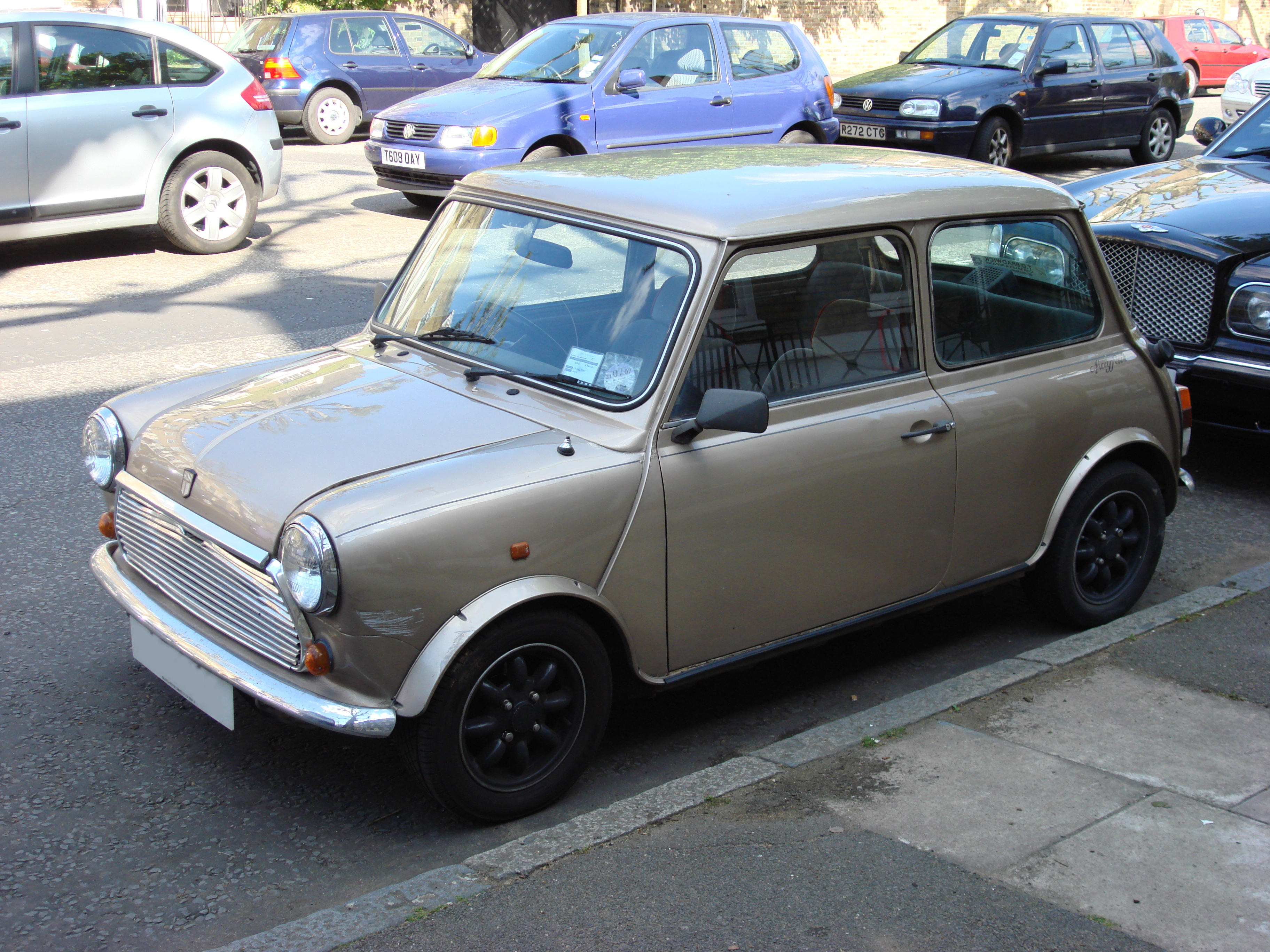 Mini Mayfair Gold